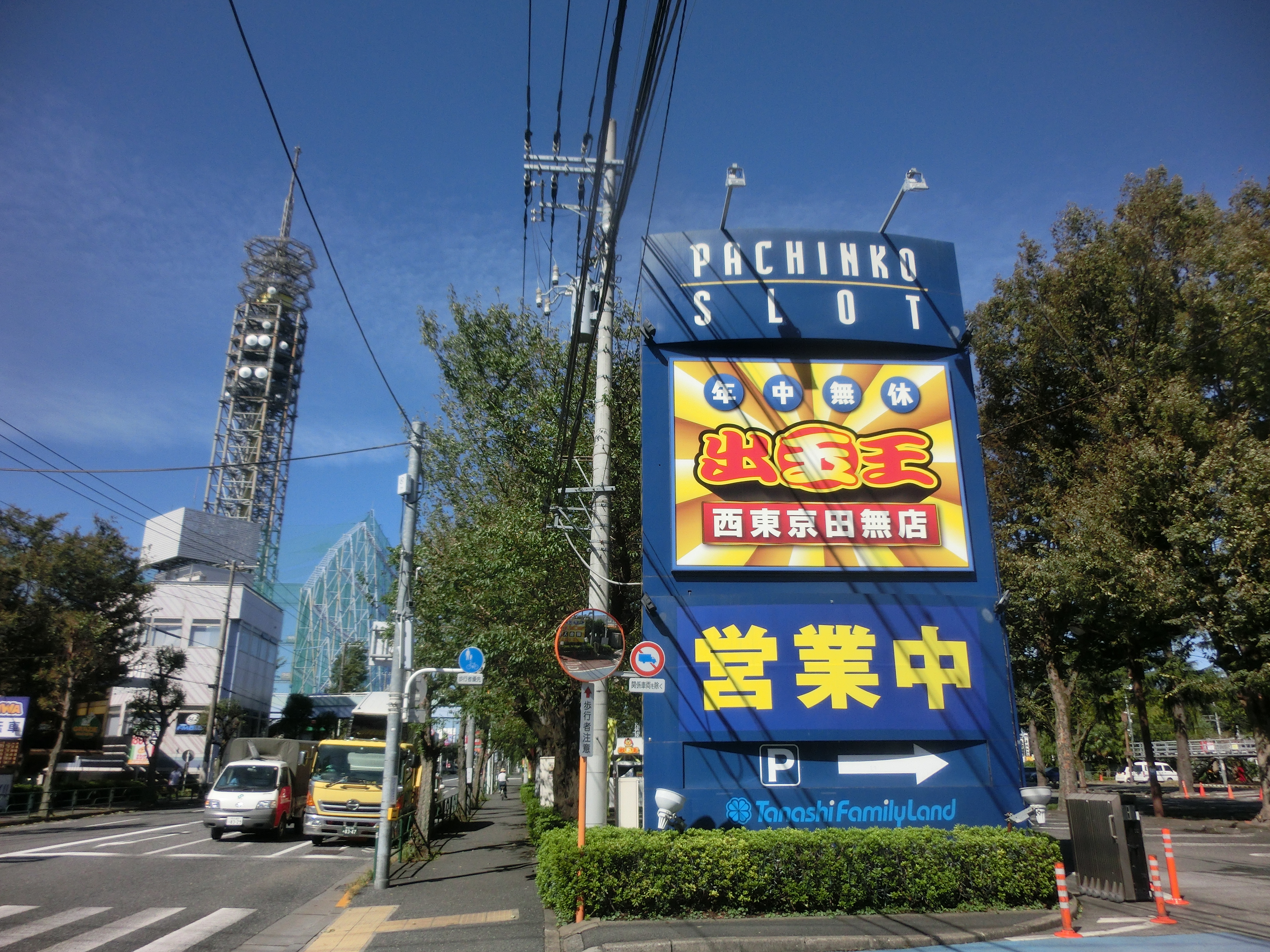 西東京市・田無ファミリーランド(2018年10月1日)